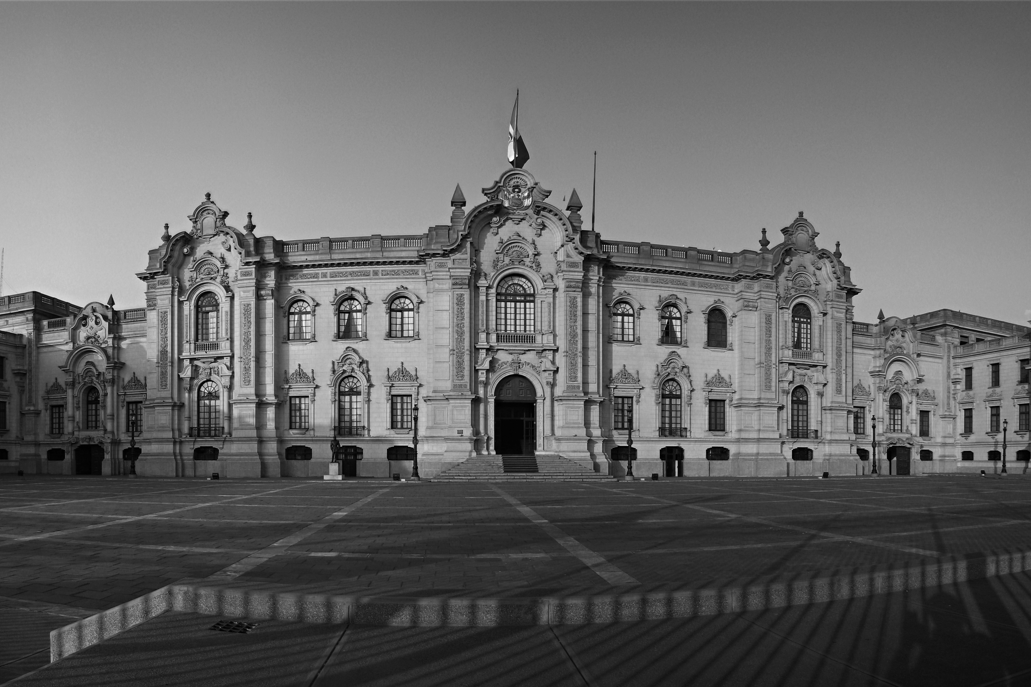 Palacio Ejecutivo del Perú (Blanco y Negro)